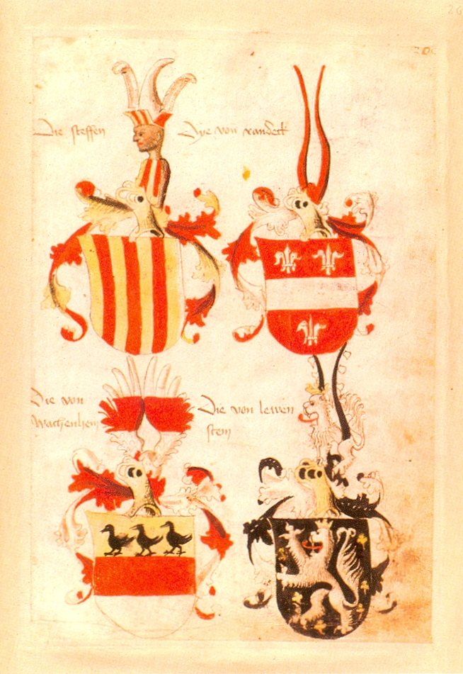 Ingeram-Codex der ehemaligen Bibliothek Cotta Die steffen Dye von randeck Die von/Wachenhem Die von lewen/stein